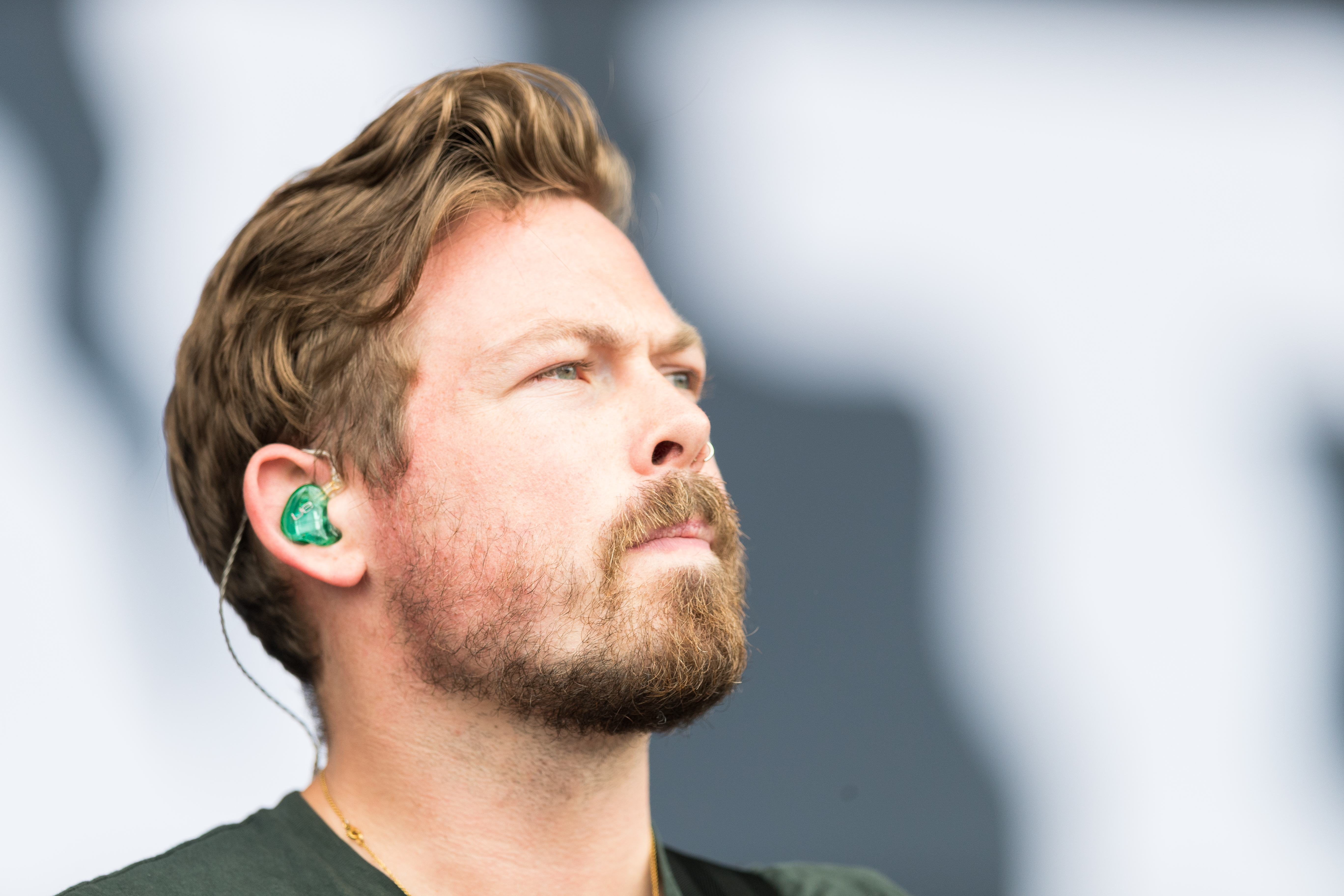 Lower than Atlantis during Rock am Ring at Nürburgring, Nürburg, Rheinland Pfalz, Germany on 2017-06-03, Photo: Sven Mandel